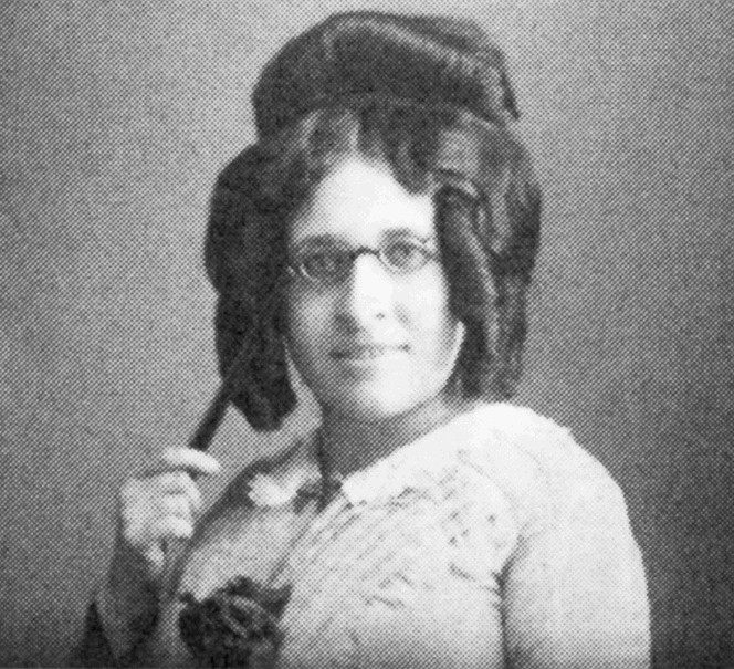 Olga Fastrová (1876 - 1965), Česká spisovatelka.